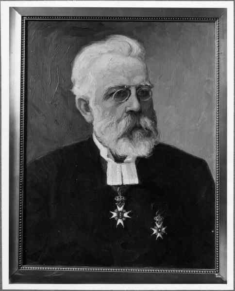 Porträtt föreställande kyrkoherden Carl Axel Emil Landquist (?) död 1933. Kategori: (09) PorträttPorträtt föreställande kyrkoherden Carl Axel Emil Landquist (?) död 1933.